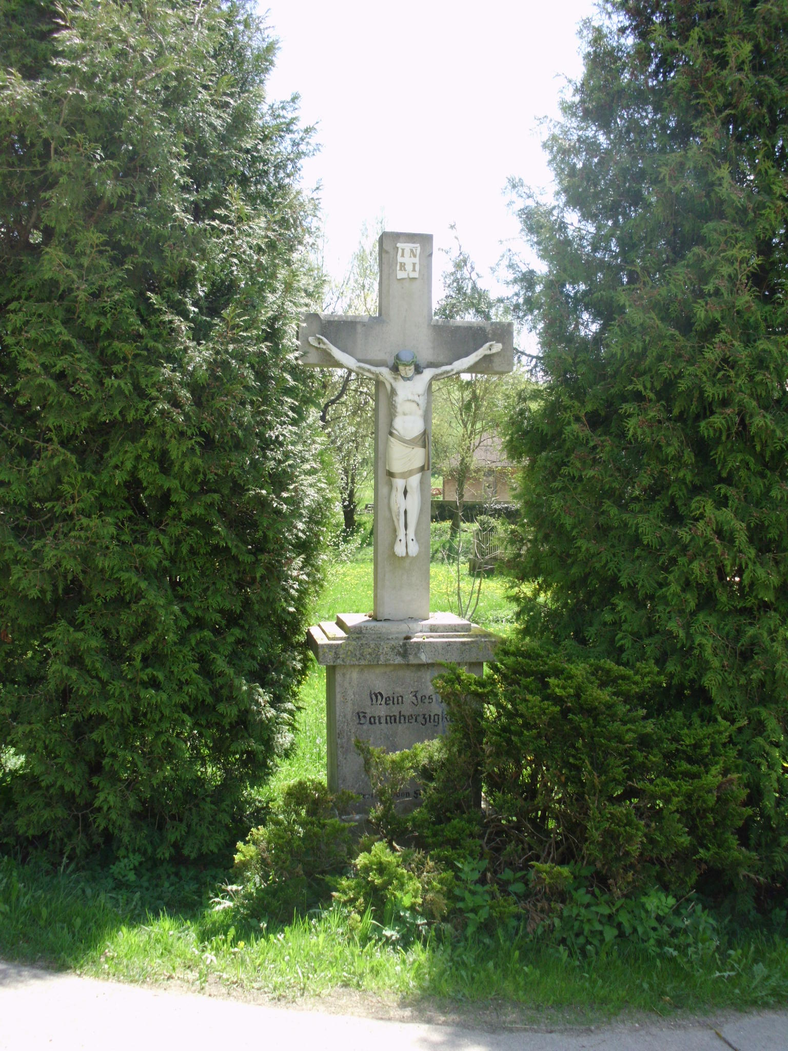 Waldmühle bei Gersdorf, einem Ortsteil von Nennslingen im mittelfränkischen Landkreis Weißenburg-Gunzenhausen, Kreuz an der Mühle